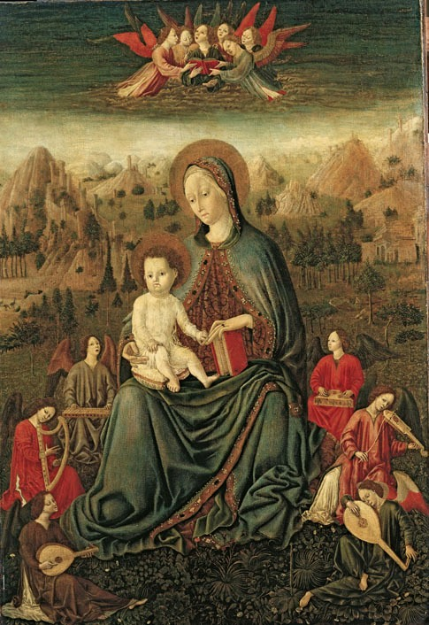 Benedetto Bembo Madonna dell’Umiltà e angeli musicanti, 1450-1455, La Spezia, Museo Civico Amedeo Lia